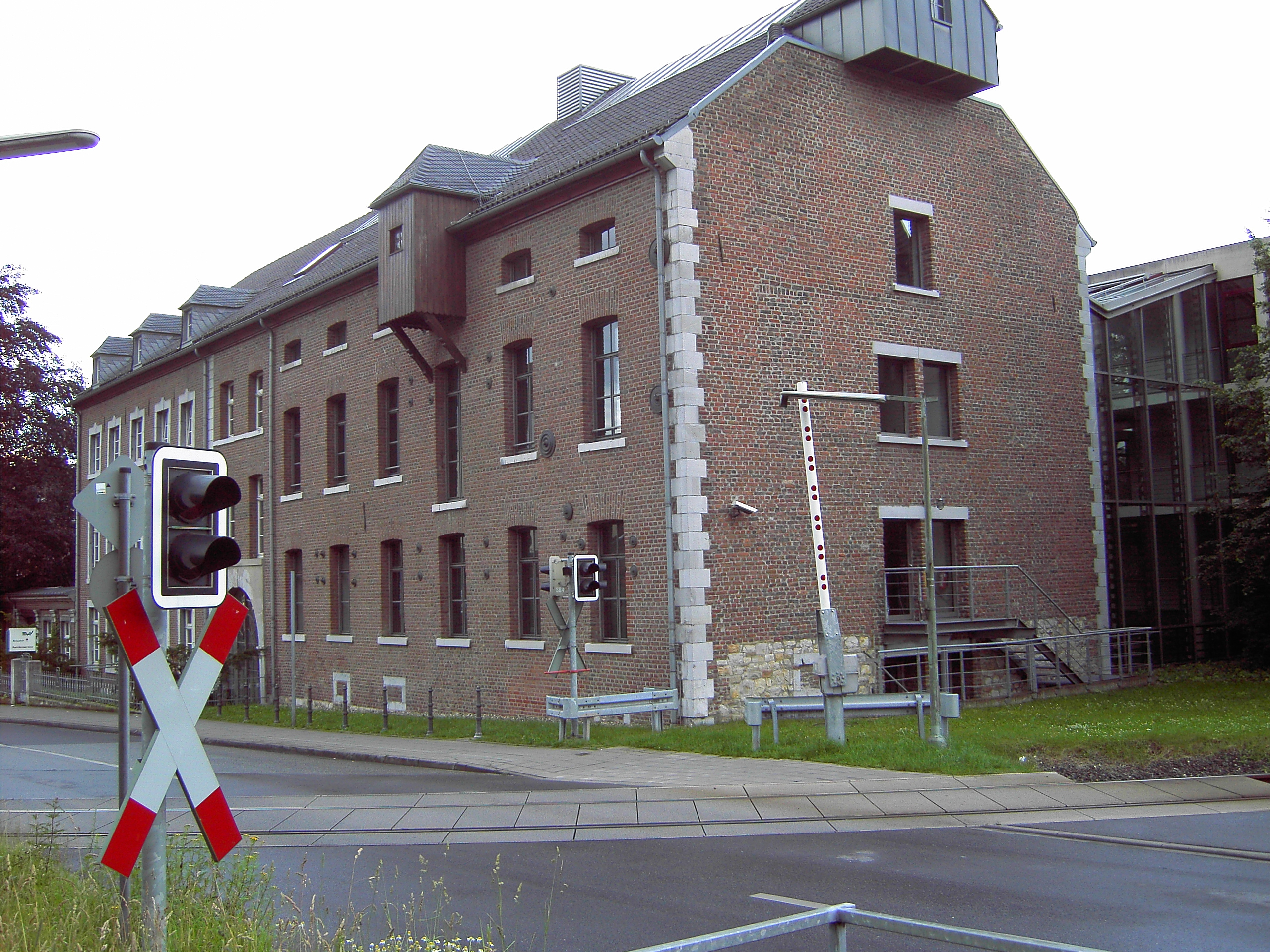 Ehemalige Brauerei Ketschenburg in Stolberg/Rhld.